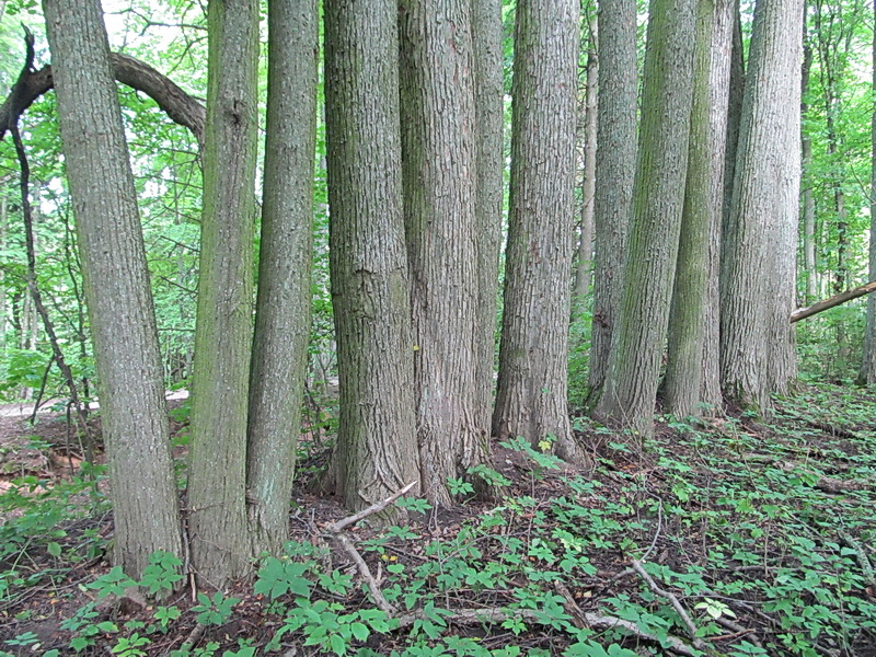 Відзы Лаўчынскія. Сядзіба